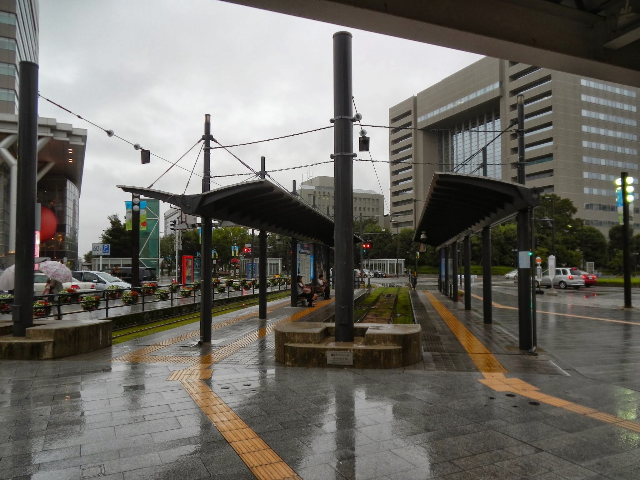 24 Ushijimachō, Toyama-shi, Toyama-ken 930-0858, Japan